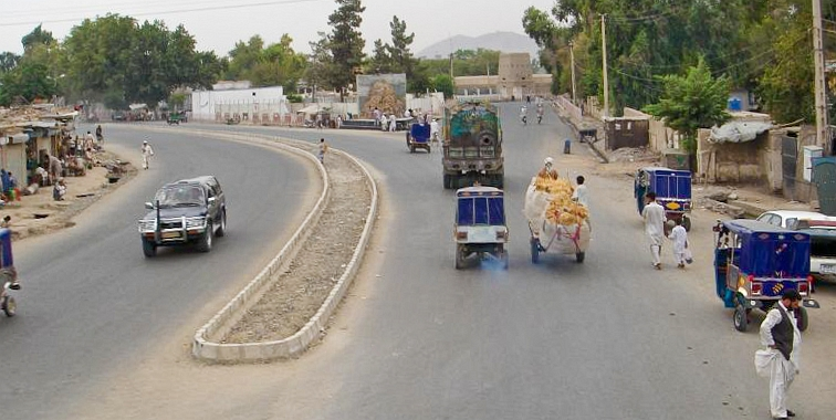 Street in Jalalabad, Afghanistan